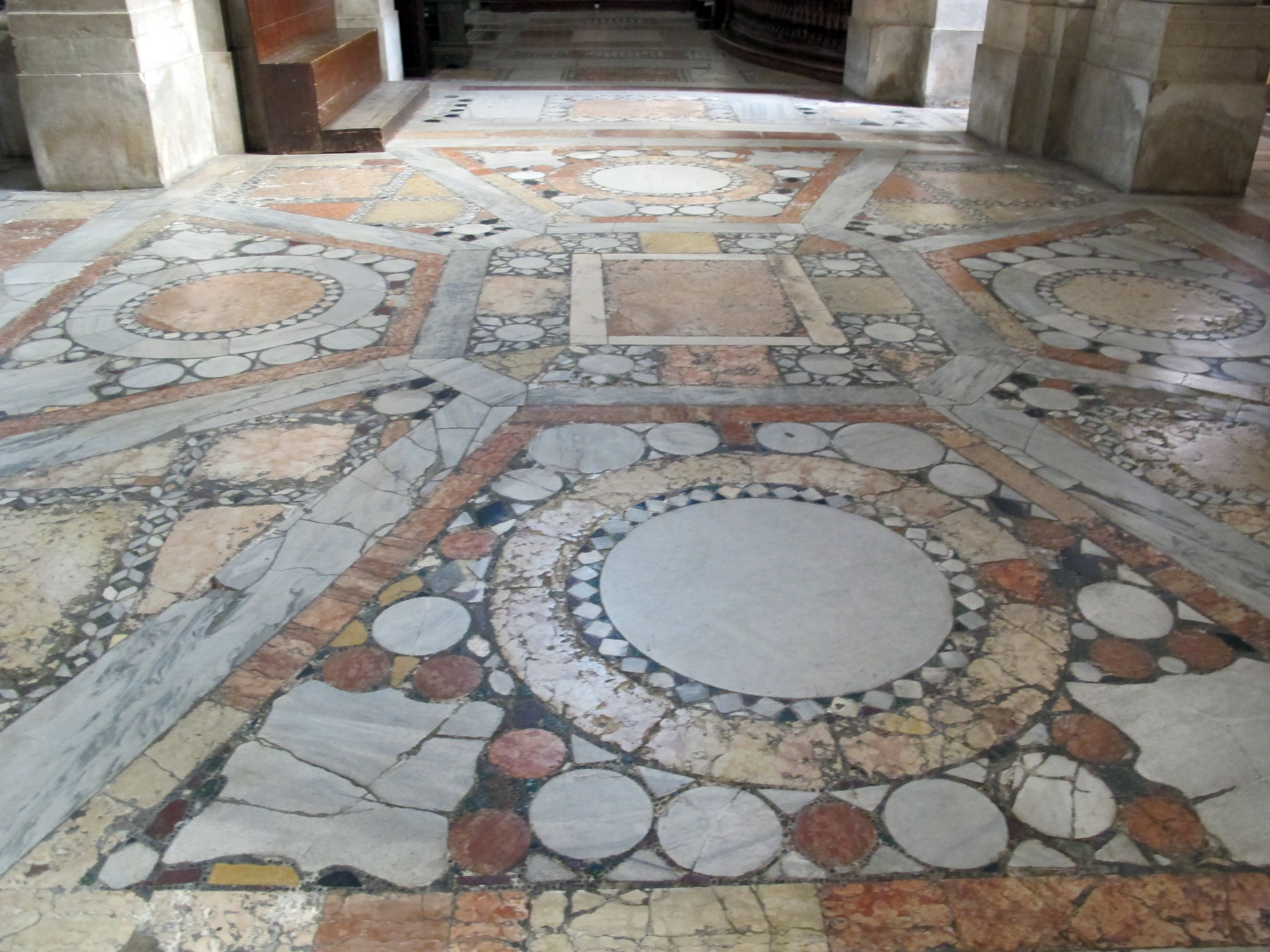 Duomo di ravenna, int., pavimento a opus sectile